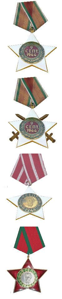 Bijgewerkte tekeningen van de versierselen.